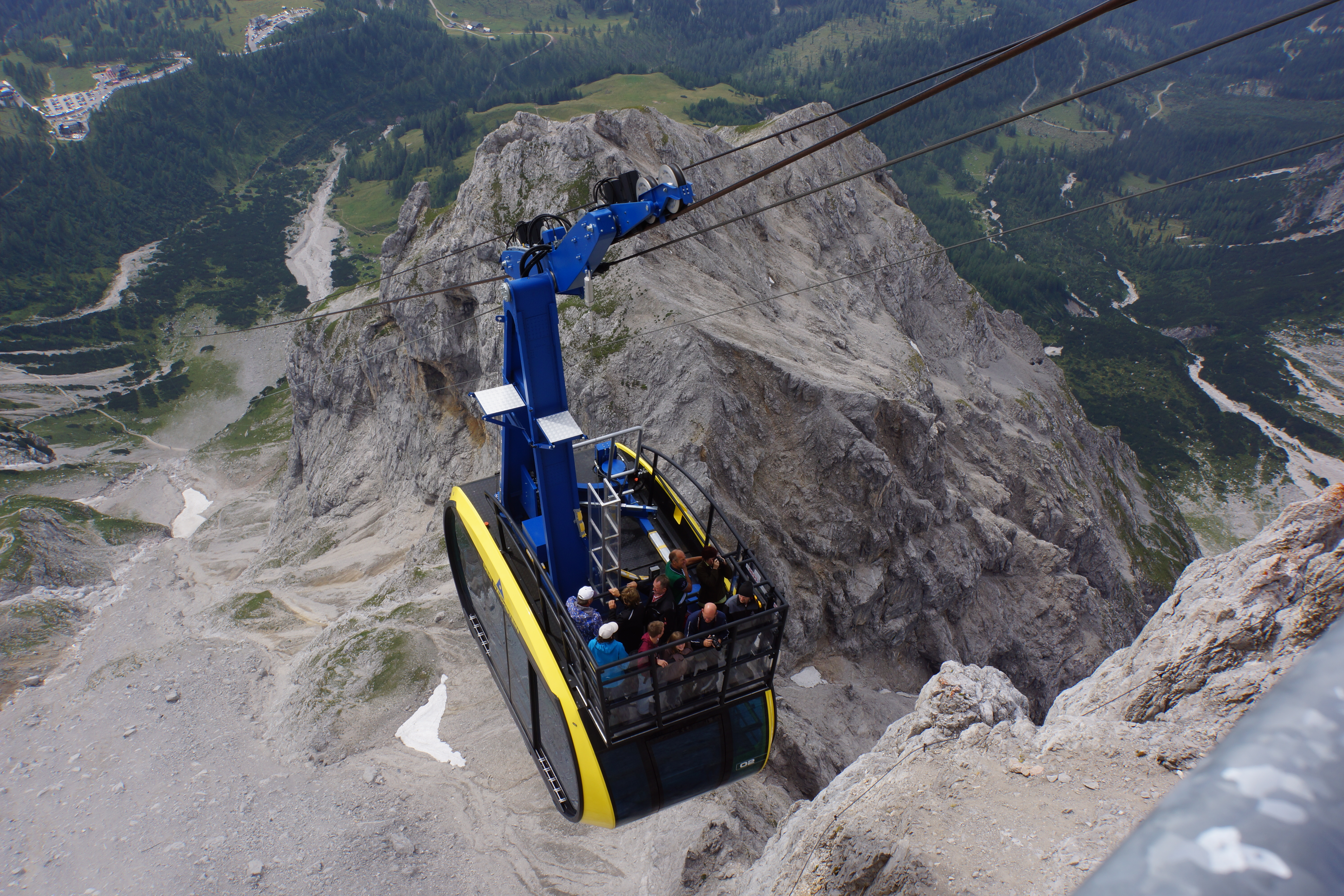 Neue Panoramagondel mit zehn Plätzen auf dem Dach